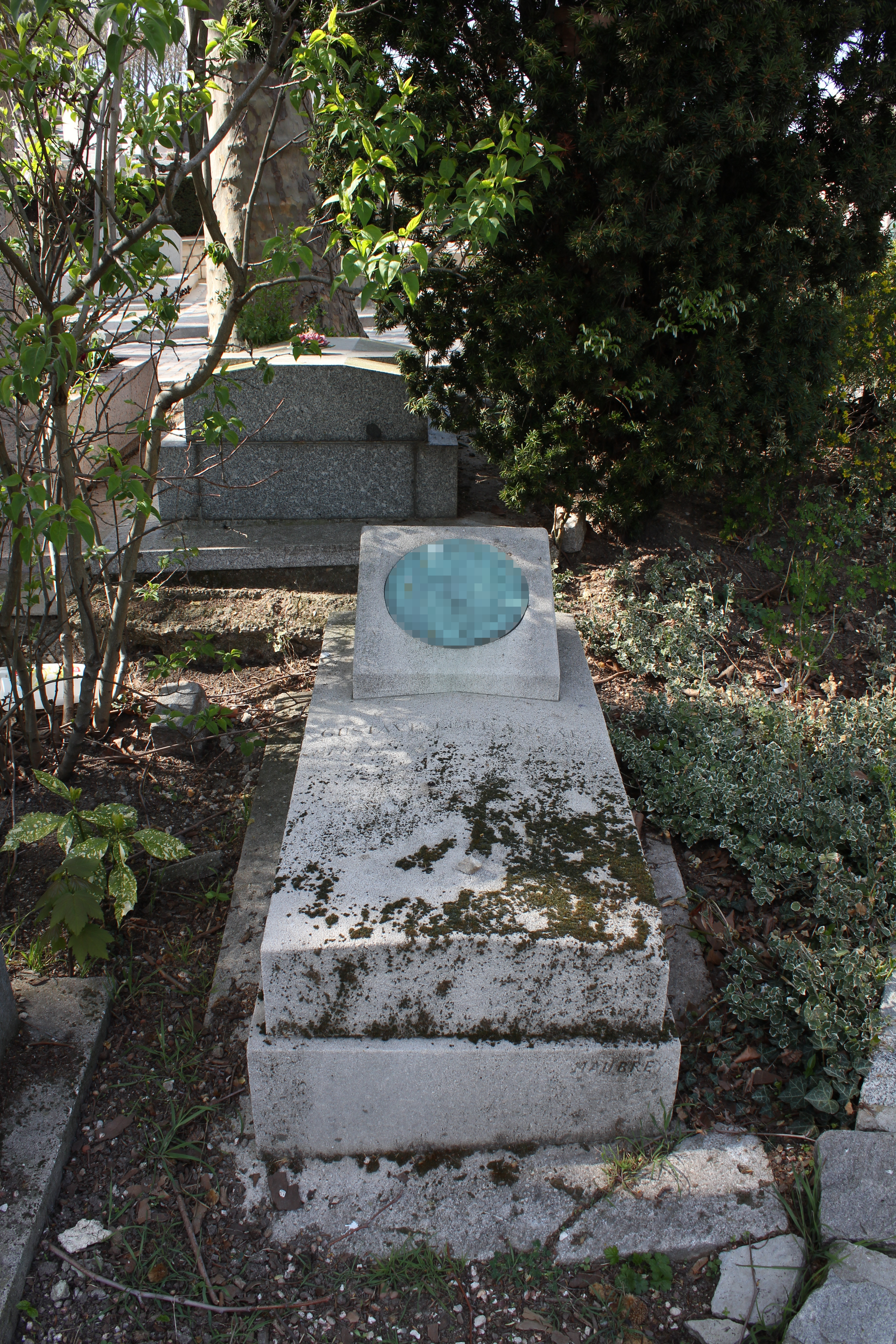 Sépulture du membre de la Commune Gustave Lefrançais (1826-1901). Monument orné d'un médaillon.